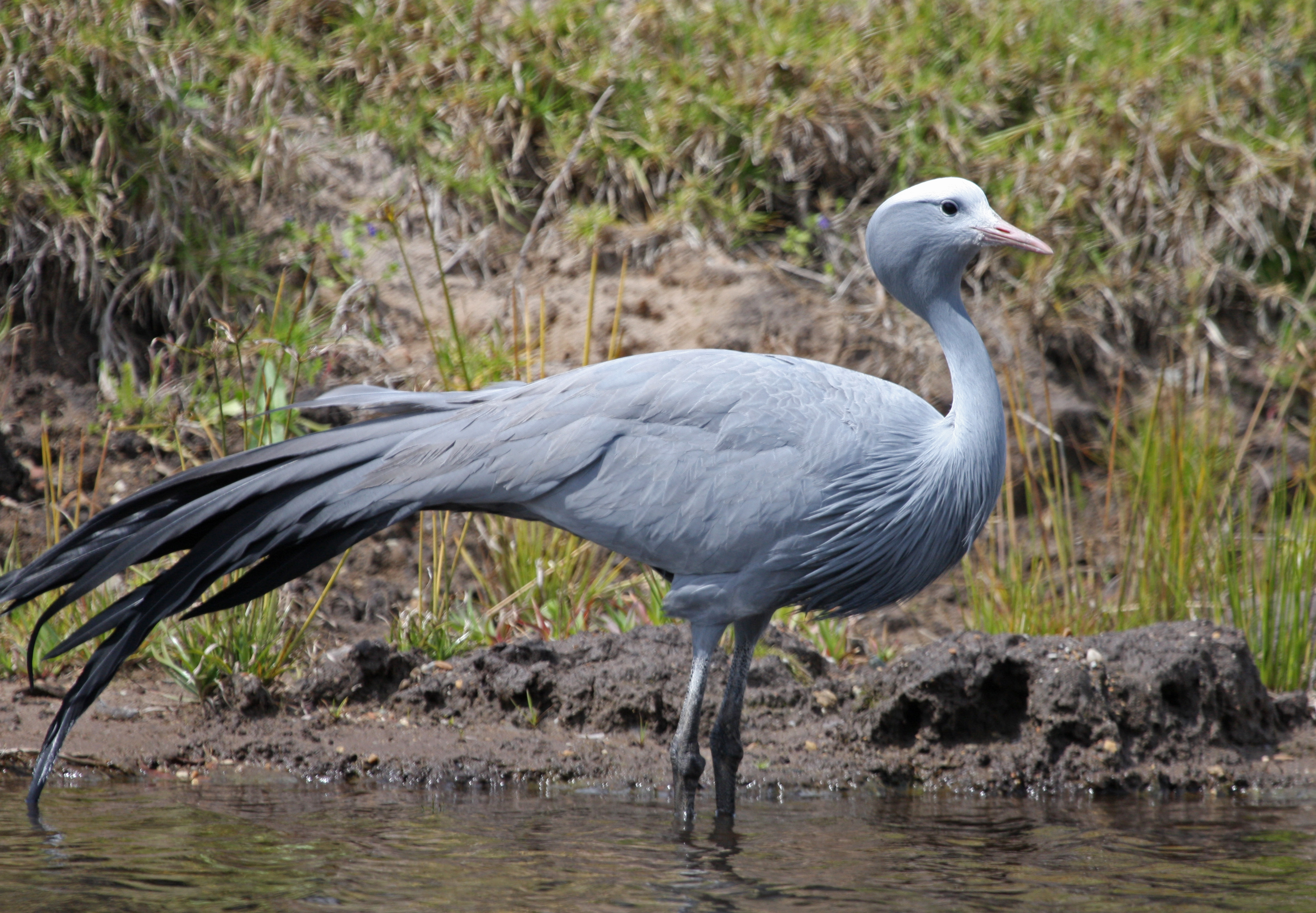 Blue Crane Anthropoides paradisea